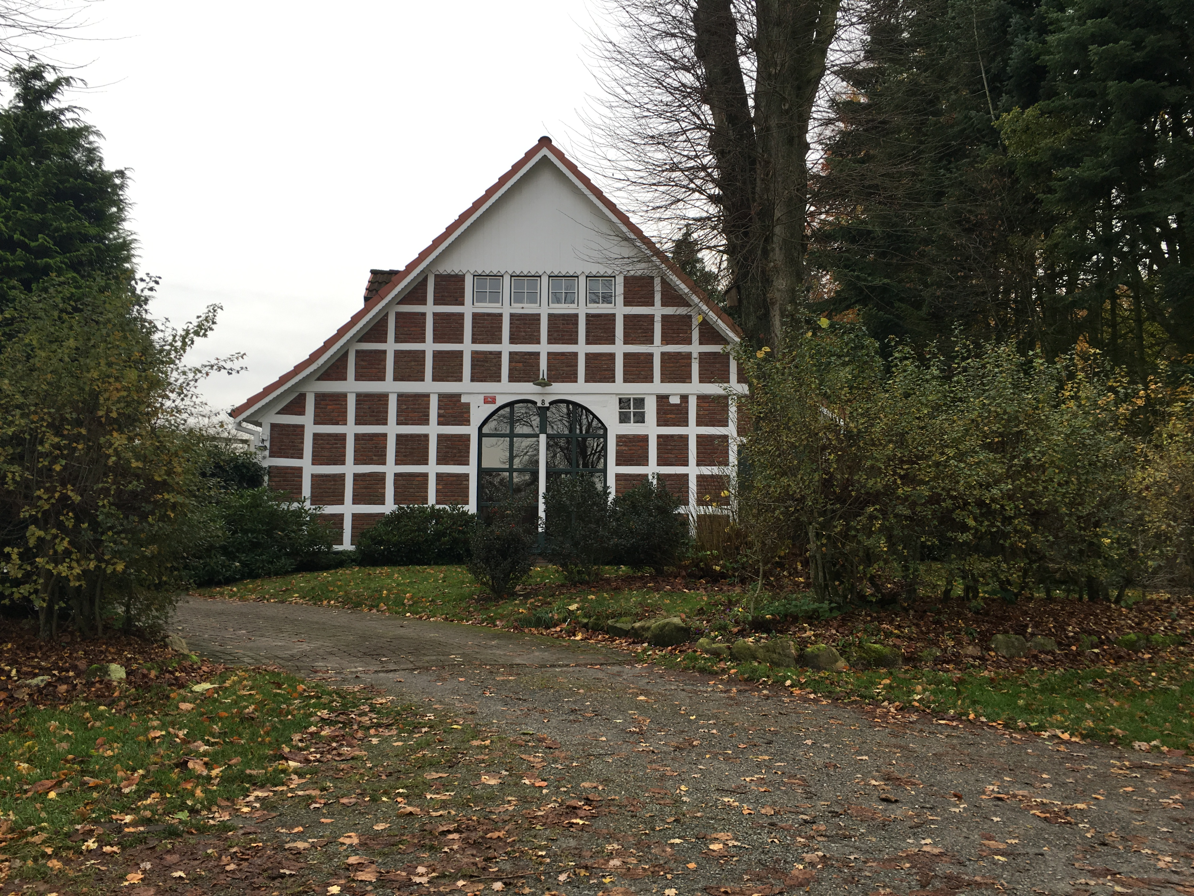 ehmalig Buurnhuus bi de Pulvermöhl, Heeßel, Landkreis Cuxhoben